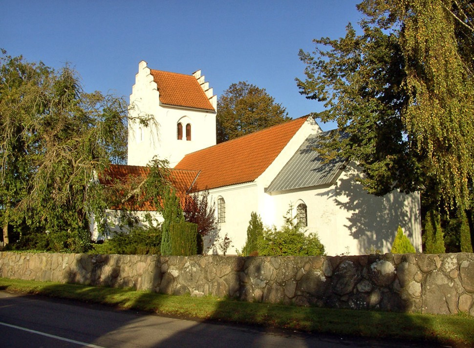 fra sydøst